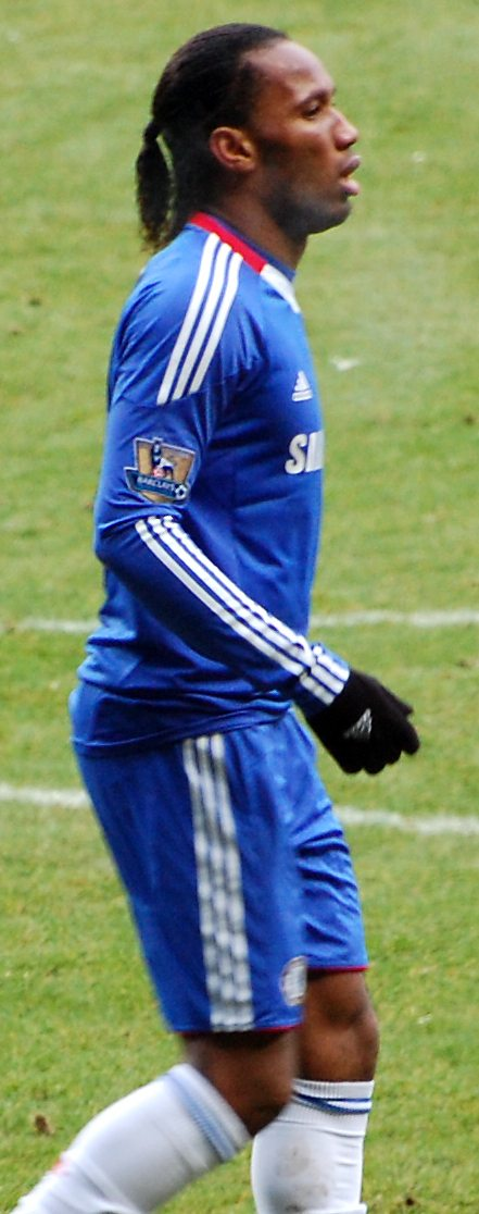 Didier Drogba cropped